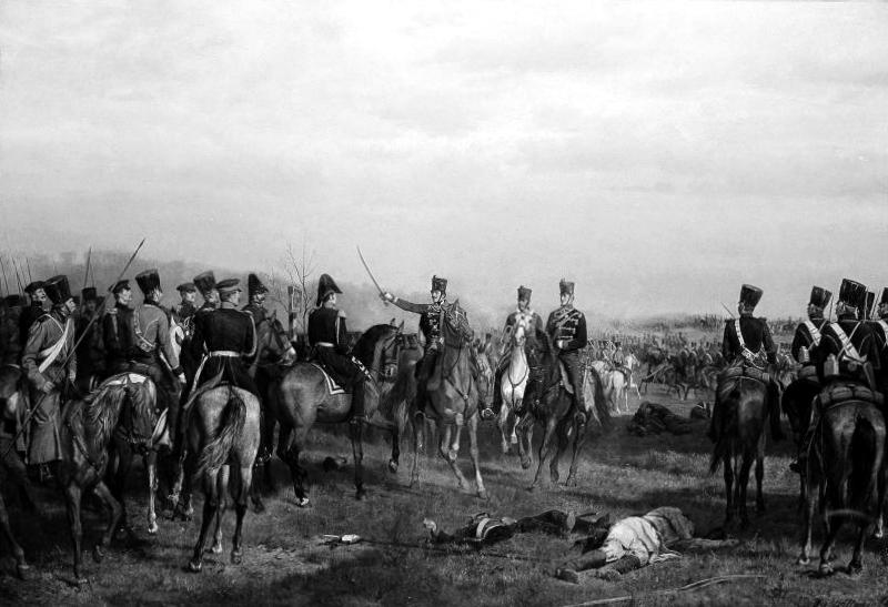 Szene aus dem polnischen Aufstand in Galizien 1846. Vereinigung russischer und österreichischer Truppen bei Krakau.title QS:P1476,de:"Szene aus dem polnischen Aufstand in Galizien 1846. Vereinigung russischer und österreichischer Truppen bei Krakau." label QS:Lde,"Szene aus dem polnischen Aufstand in Galizien 1846. Vereinigung russischer und österreichischer Truppen bei Krakau."